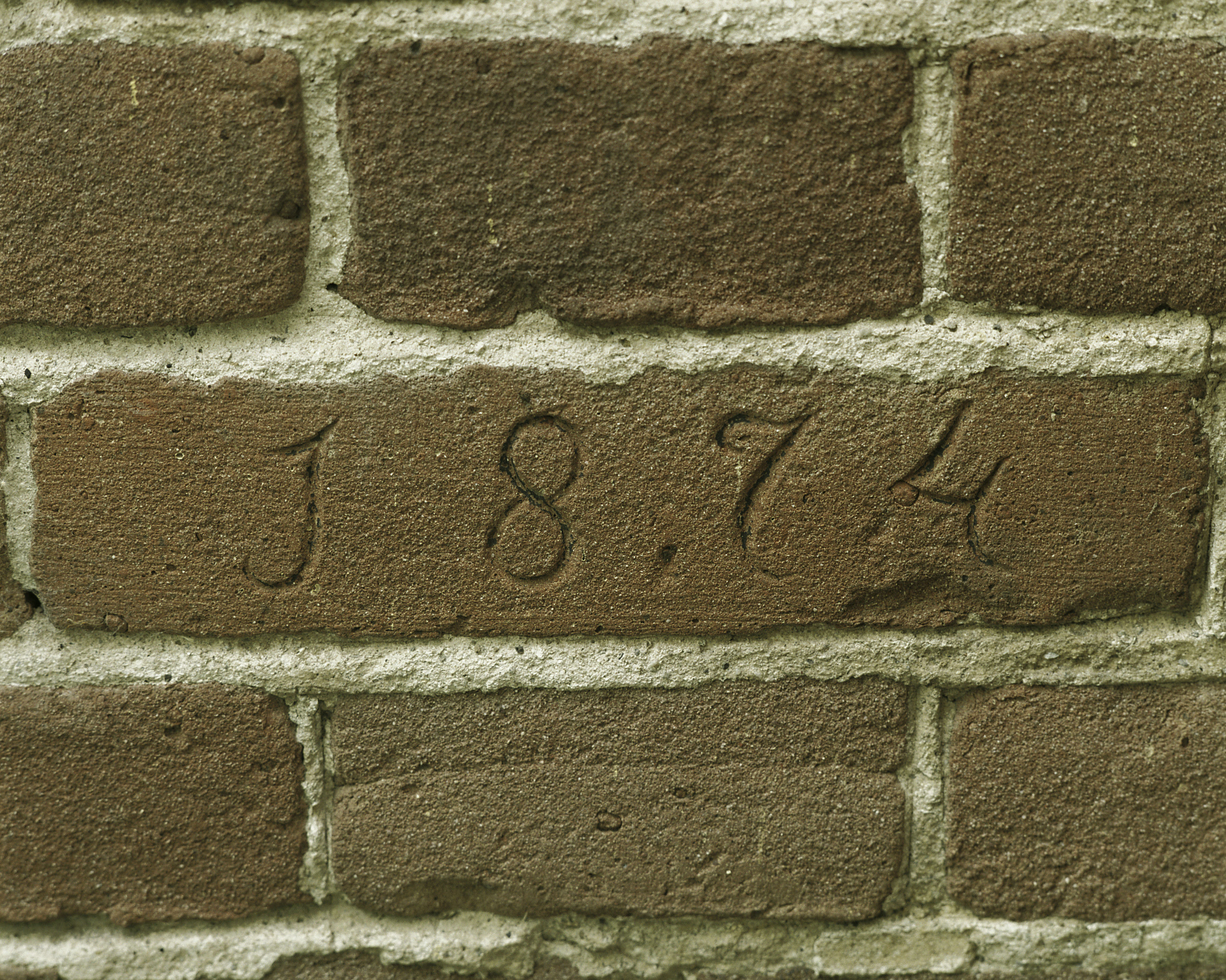 Margarethe: Baksteen met ingekrast bouwjaar: 1874, zit in de voorgevel naast het risaliet